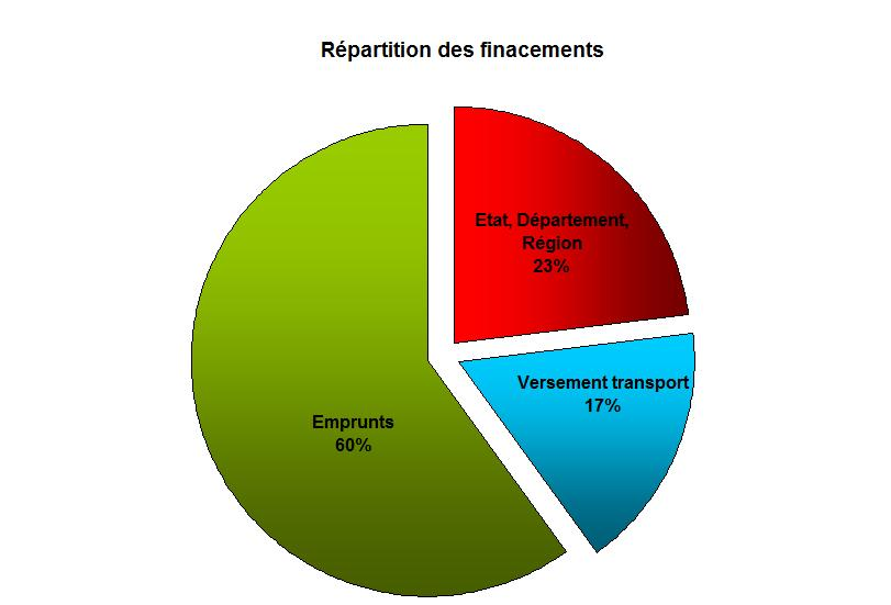 Répartition du financement entre les différents acteurs du chantier